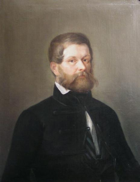 Józef Kasper Pochwalski (1816-1875). Autoportret